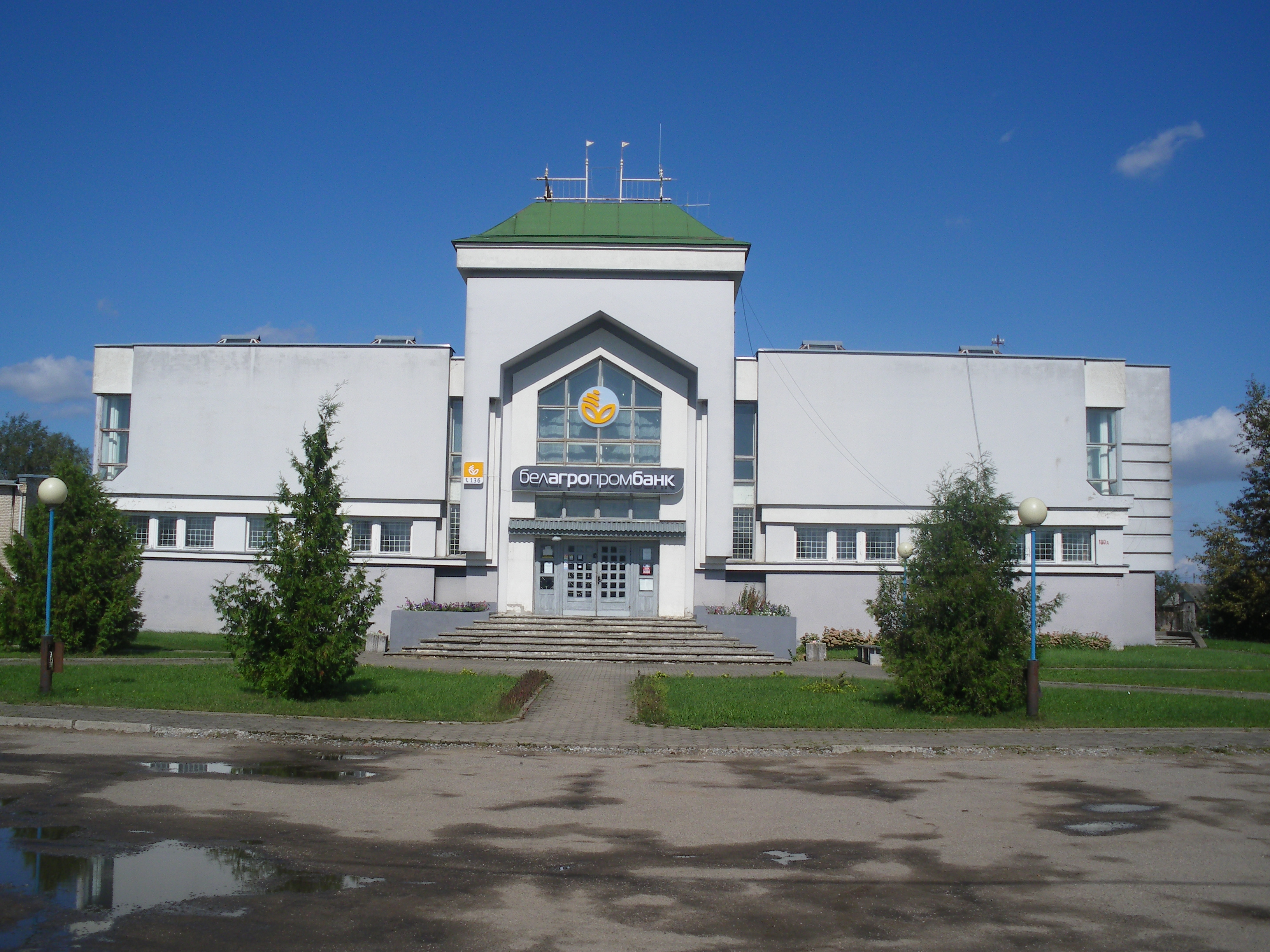 Bank w Raduniu